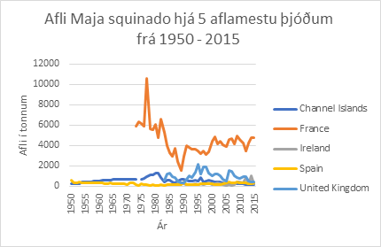 Afli Maja squinado hjá 5 aflamestu þjóðum frá 1950-2015